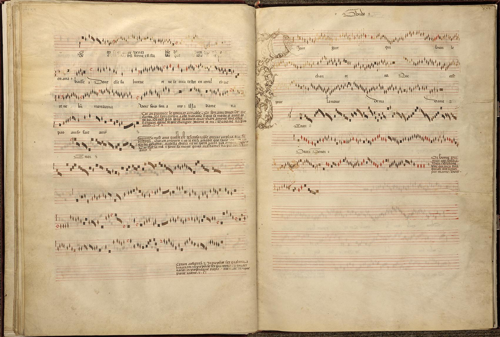 Codex Chantilly